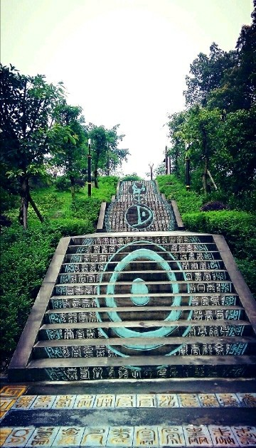 这是我自己拍摄的作品，长寿菩提寺万寿天梯。